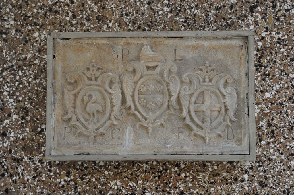 Stemmi di Pasquale Cicogna, Pietro Loredan, Filippo Bragadin. Località di provenienza: Iraklion, Creta. Il manufatto originale è datato 1569. Attualmente il calco in gesso è conservato presso l'Istituto Veneto di Scienze, Lettere ed Arti.